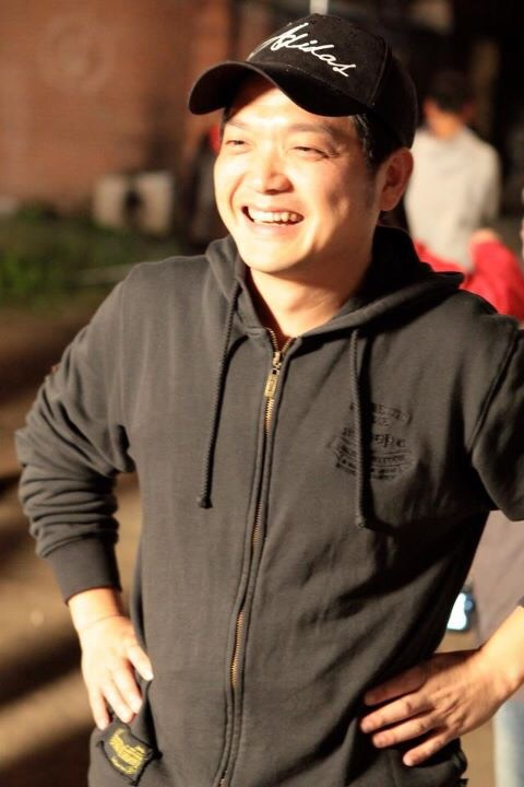 台灣電視節目製作人、導演、導播龔美富，曾任三立電視節目部資深總監。